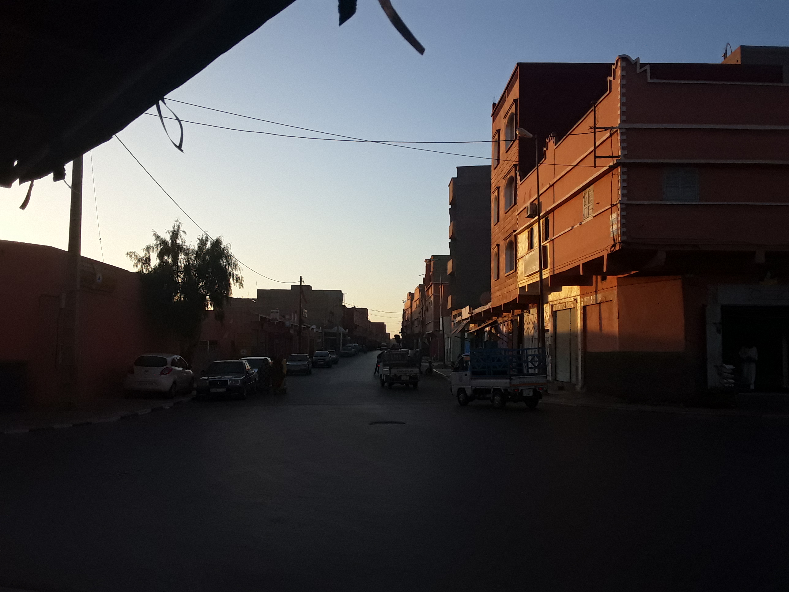 حي من أحياء مدينة كلميم المغربية،والتي هي صورة مميزة تبين الغروب وجماله في عمران المدينة الكلاسيكي والمليء بالإحساس القديم